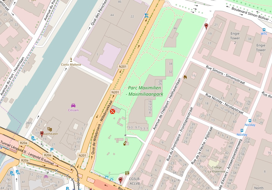 Pan de situation de l'ancien héliport de Bruxelles-Allée-Verte. Il était situé sur la parcelle actuelle du Parc Maximilien entre le quai de Willebroeck et l'avenue de l'Héliport.